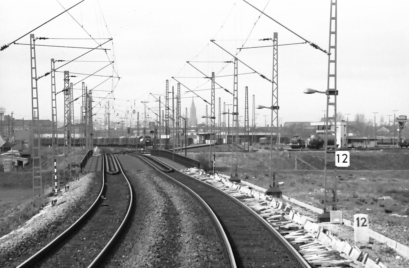 W 134 Nr. 090905 Kehl: Strecke Einfahrt Kehl mit Straßburger Münster